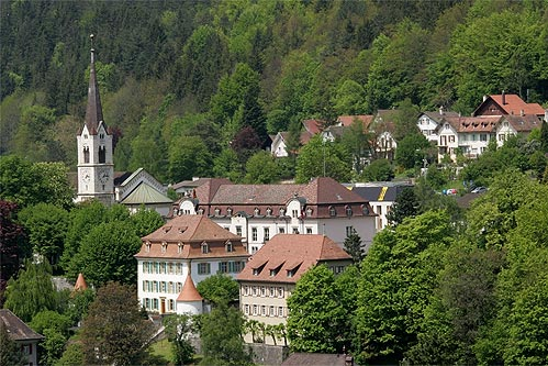 Moutier: La Collégiale St.-Germain et le Château